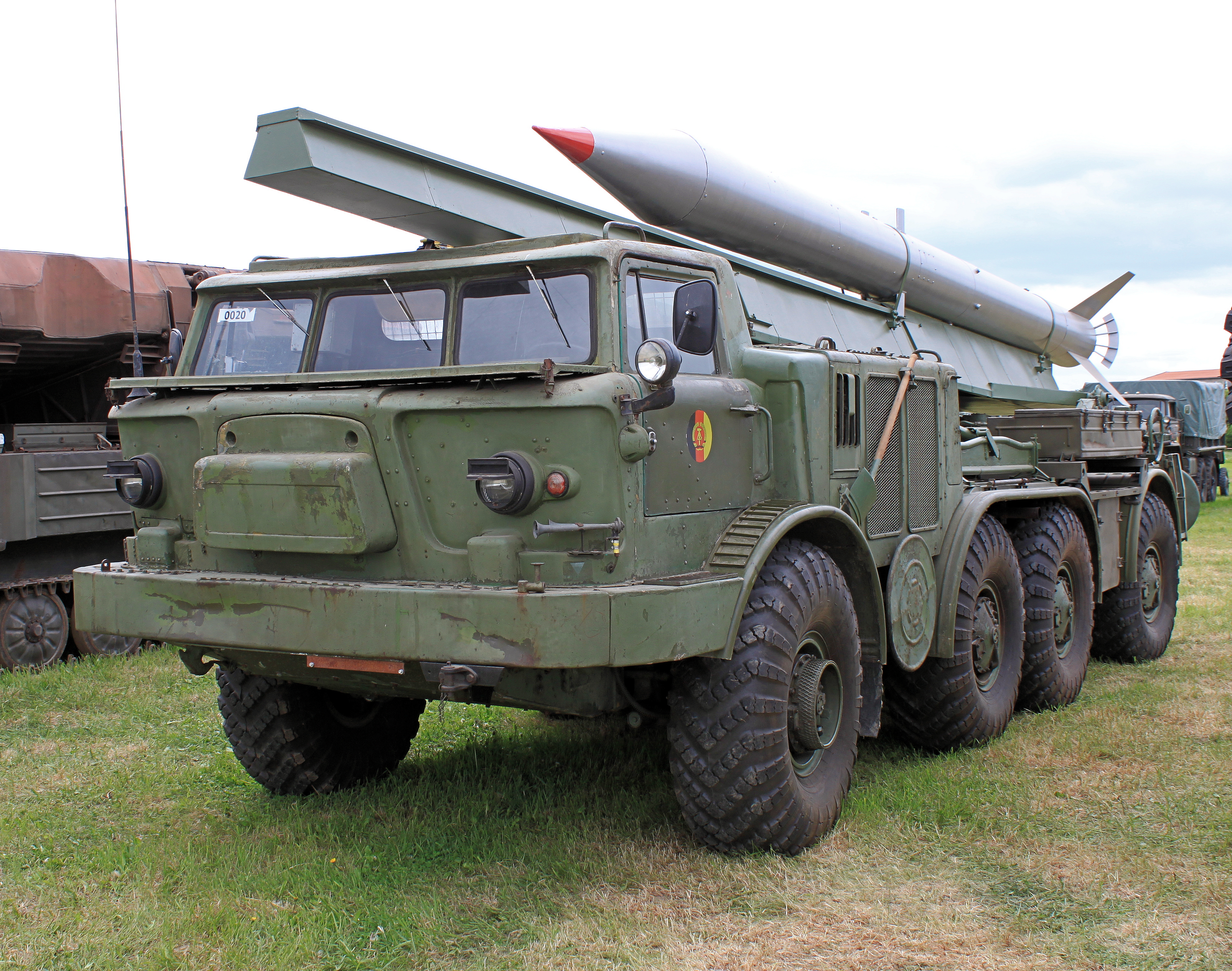 Ehemalige Startrampe vom Raketenkomplex LUNA-M auf LKW ZiL 135LM